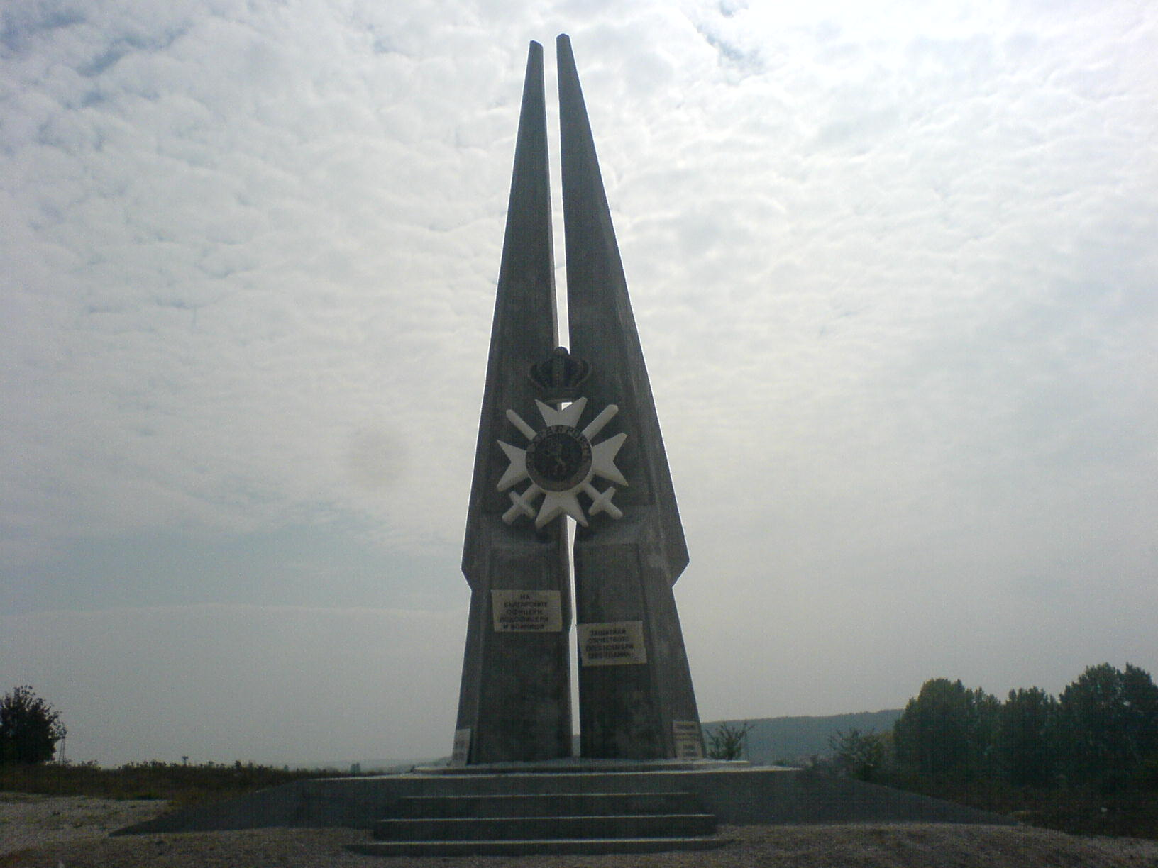 Новия паметник - Сръбско-българската война на път Е80, Сливница Архитект - Петър Москов Autor:Biser Todorov